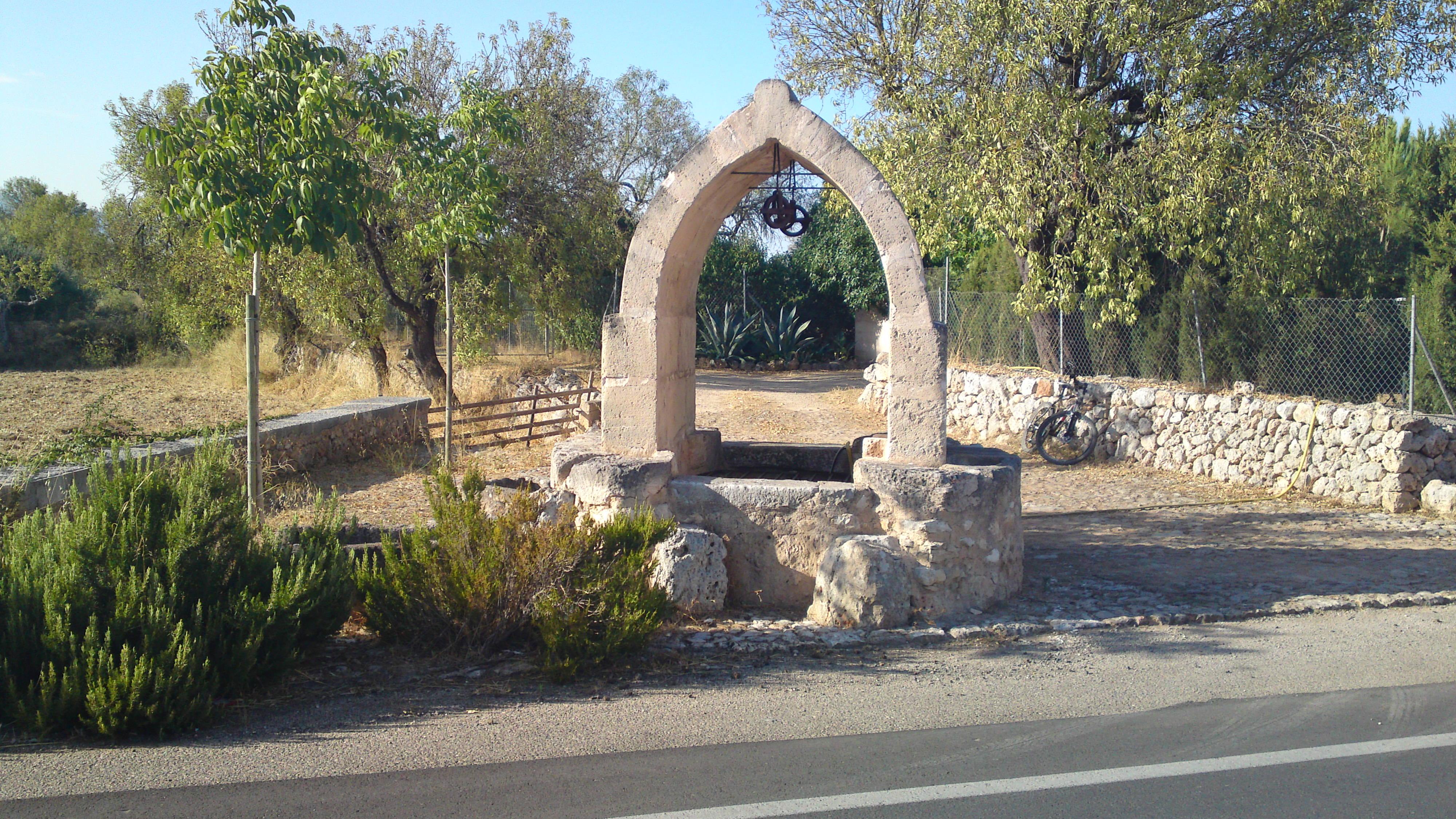 Pou de Judí vora la carretera de Sineu (MA-3111) al municipi de Sencelles